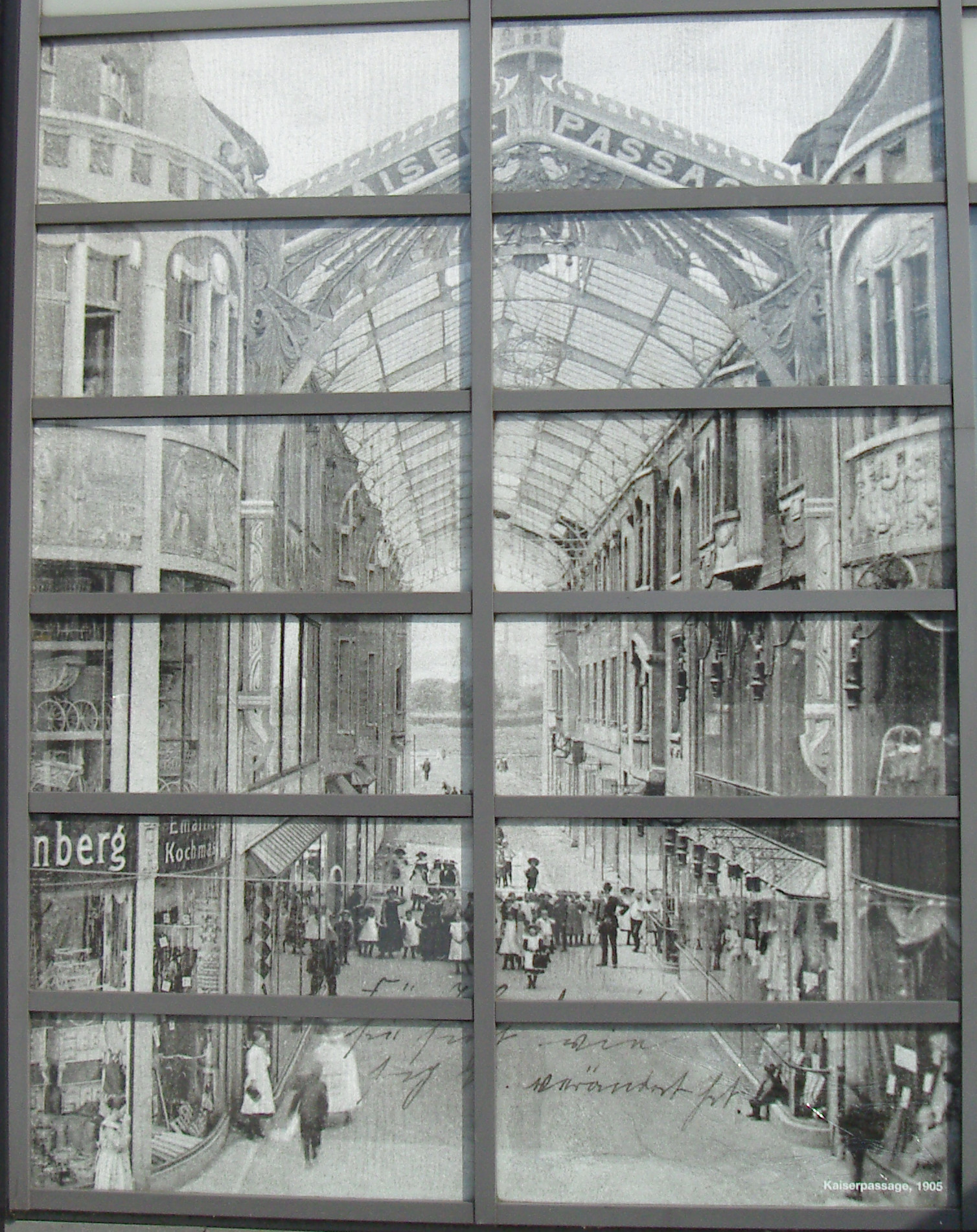 Die ehemalige Kaiserpassage in Wanne-Eickel aus dem Jahre 1905-1910. Aufnahme von der Glasfront des Wanne-Eickel Hbf